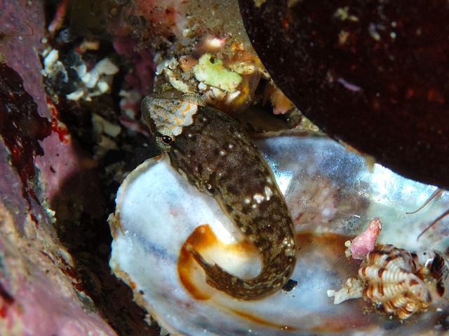 アンコウウバウオ Conidens laticephalus